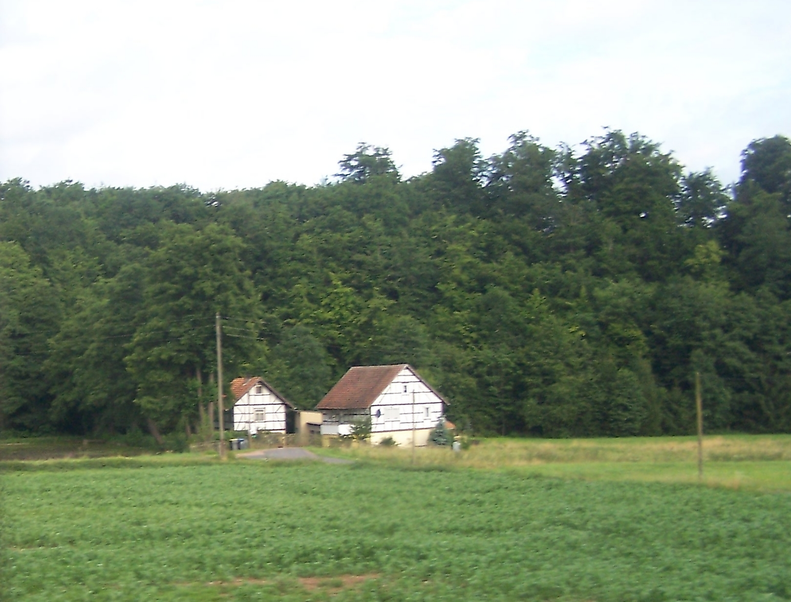 Die Taubenellner Mühle.